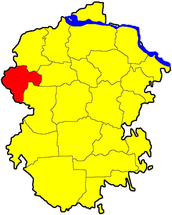 Красночетайский район на карте Чувашии